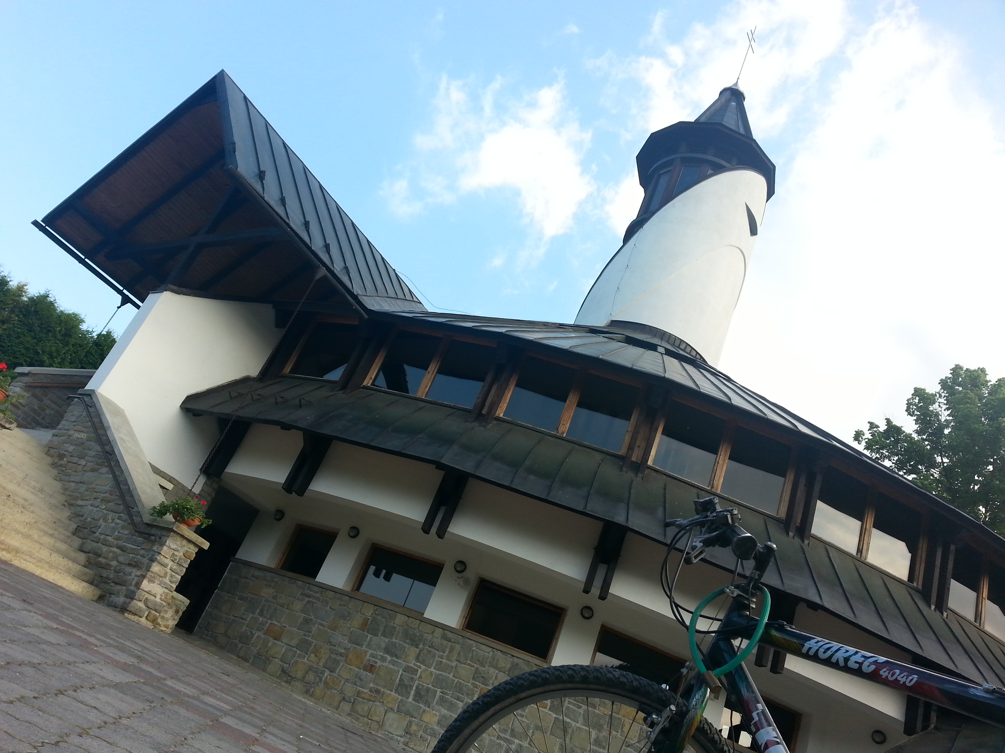 Church in Lomná